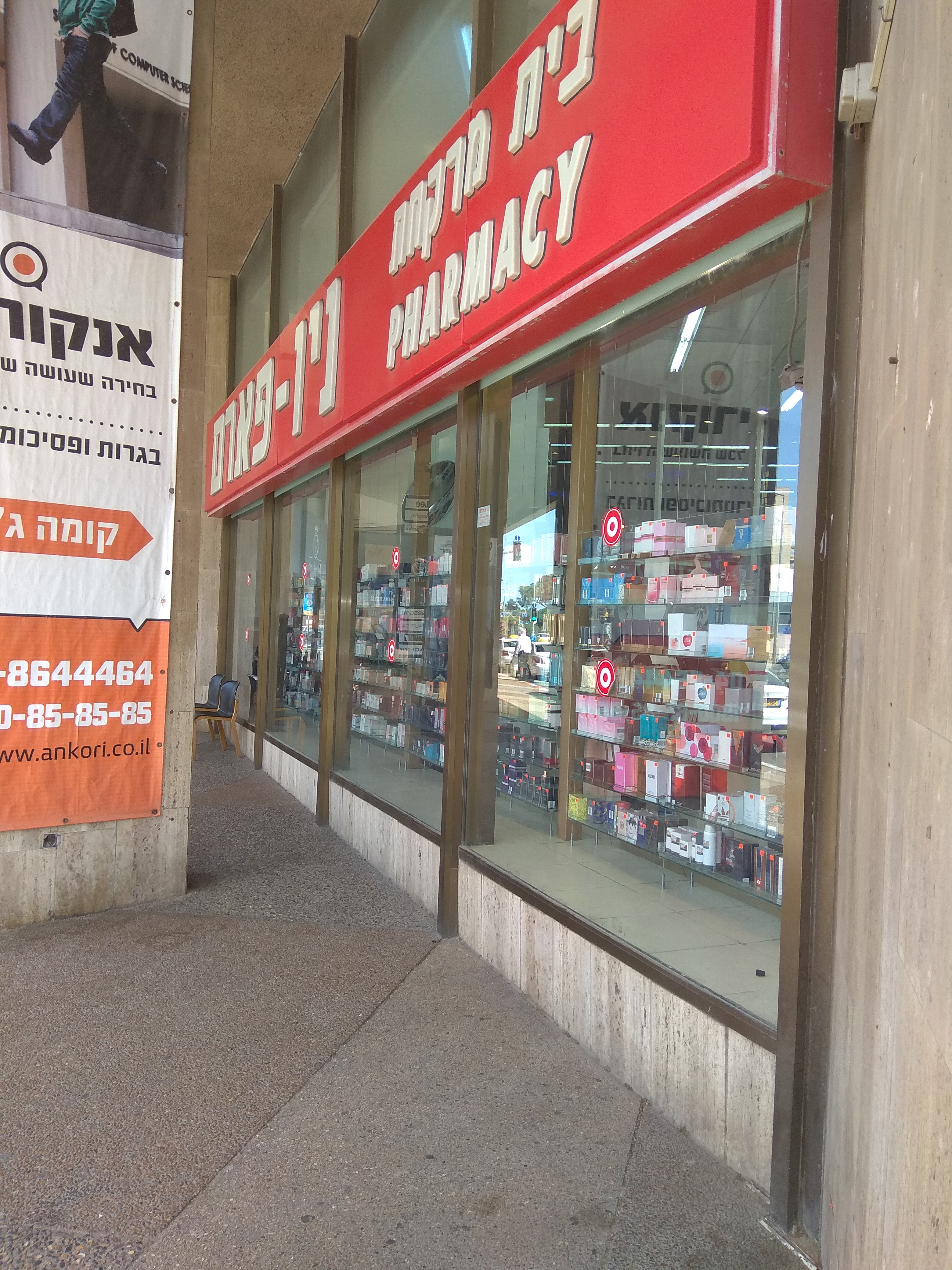 סניף ניו פארם